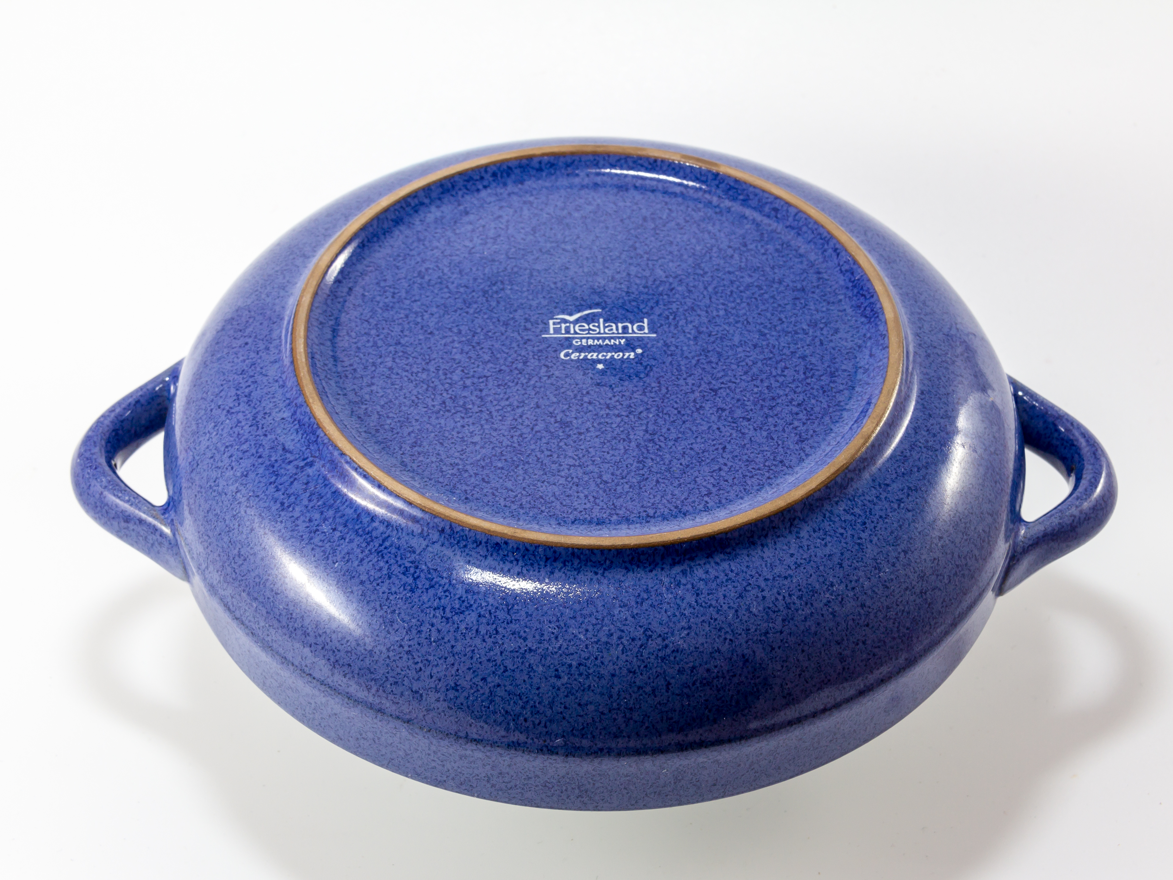 Flache Suppenschale, Service Ammerland blue, Rückseite, Friesland Porzellanfabrik